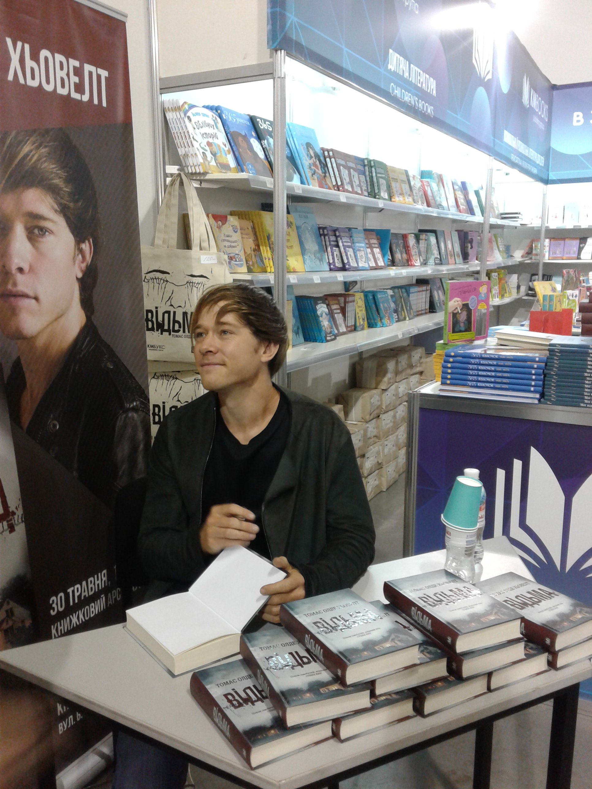 Томас Олде Гевелт (Thomas Baudelet Olde Heuvelt) на Книжковому Арсеналі в Києві